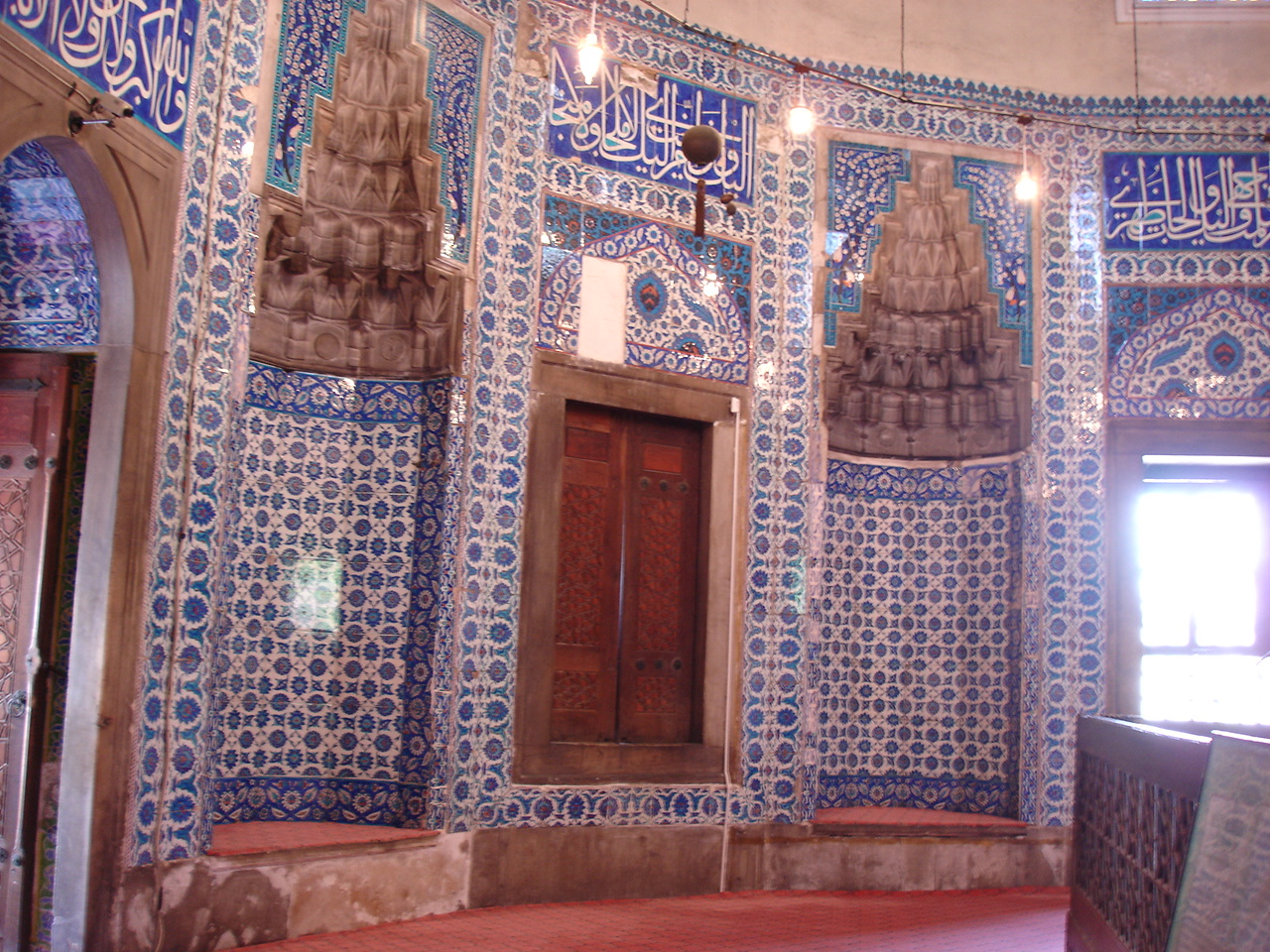 La türbe (cappella funeraria) di Roxellana nel cimitero della Moschea di Solimano il Magnifico ad Istanbul. Foto di: Giovanni Dall'Orto, 26-5-2006.